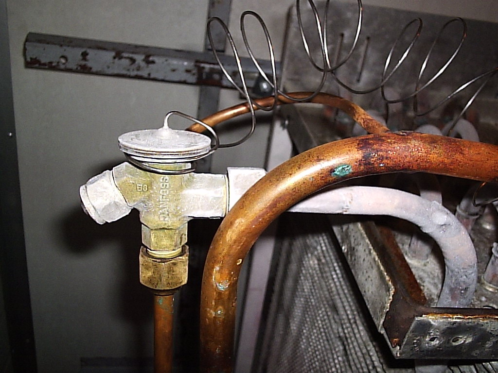 Válvula de expansión termostática con compensación externa para R22 operando a la entrada de un evaporador de tubo aleteado y tiro forzado. El refrigerante en estado líquido ingresa a la válvula por la parte inferior. A la derecha de la imagen se encuentra el bulbo sensor instalado a la salida del evaporador